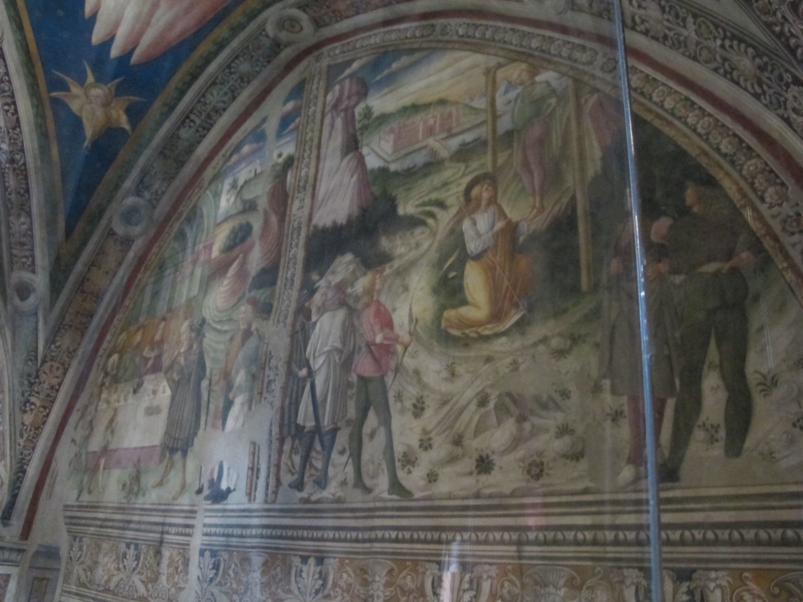 Assisi, oratorio dei pellgrini, affreschi di pierantonio mezzastris, 1477